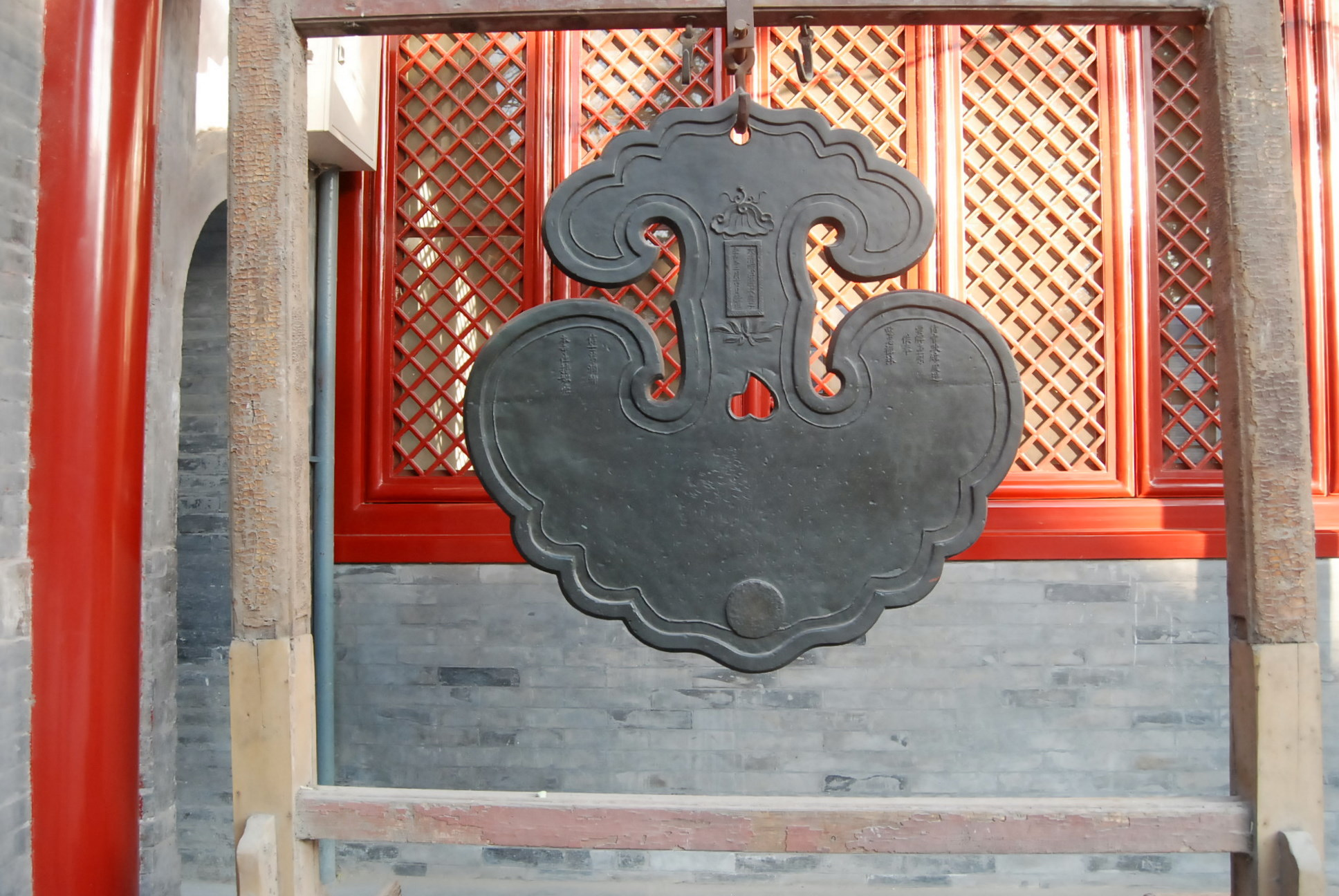 雲板，位于法源寺